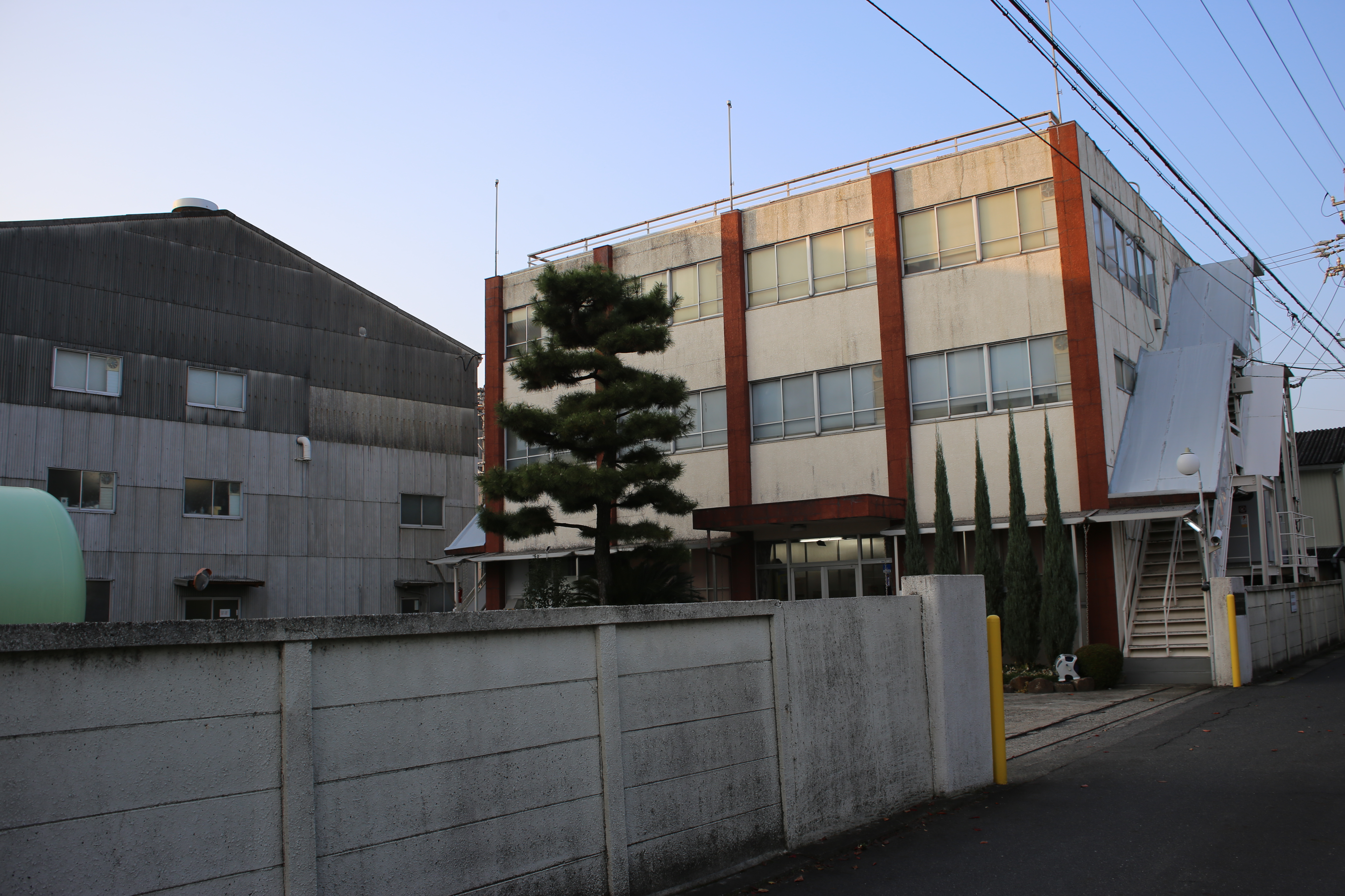 愛知県春日井市高蔵寺町の富士シリシア化学本社